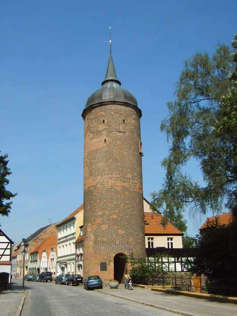 Roter Turm in Luckau, Land Brandenburg, Deutschland Bild aufgenommen am 25.6.2006 durch Olaf Meister